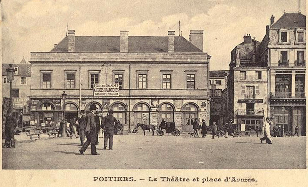 La place d'Armes et le Théâtre de Poitiers, carte postale vers 1900 (éditée par les Galeries Parisiennes).